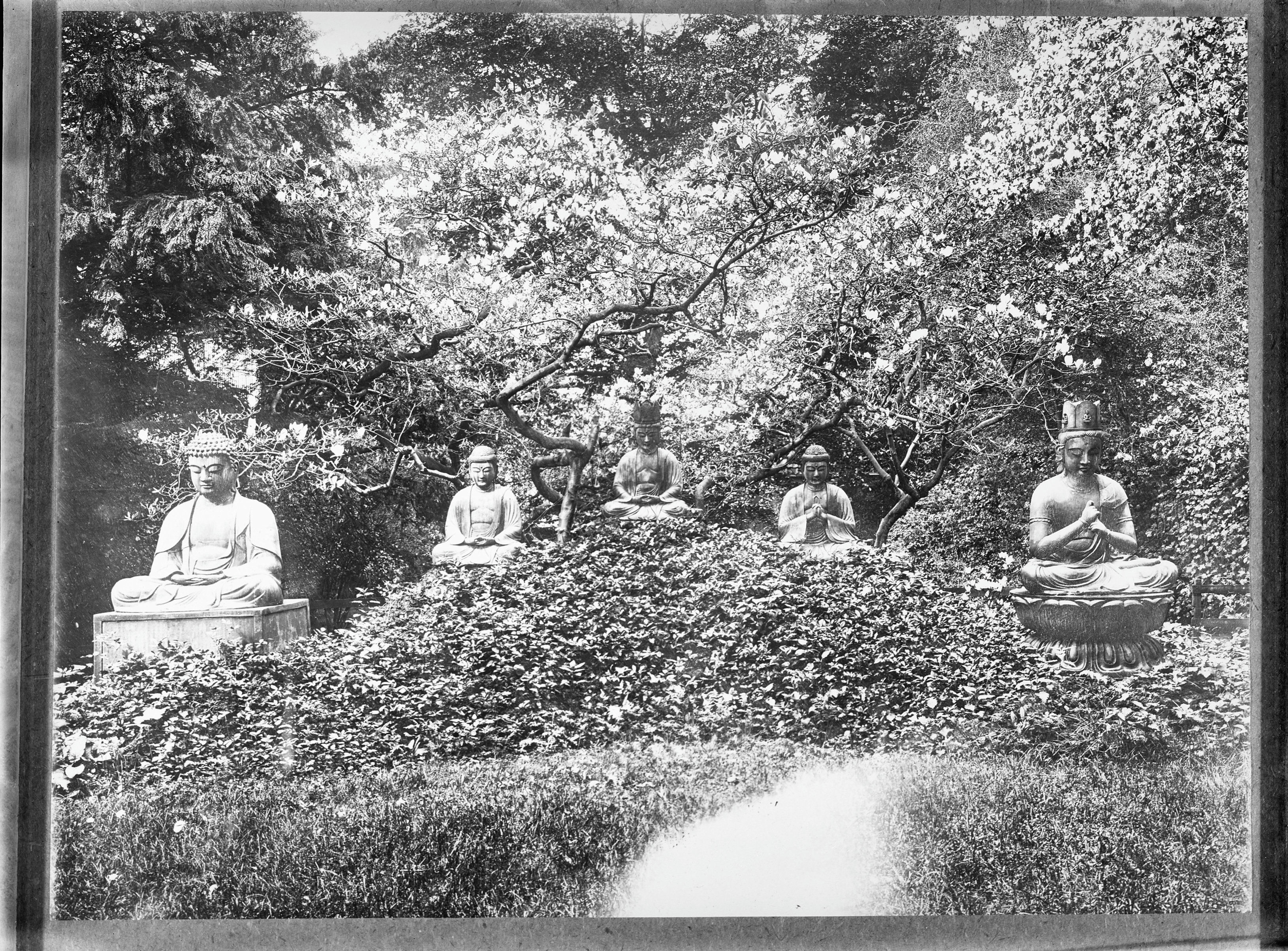 Diversen: Boeddhabeelden in de tuin van het Ethnographisch Museum